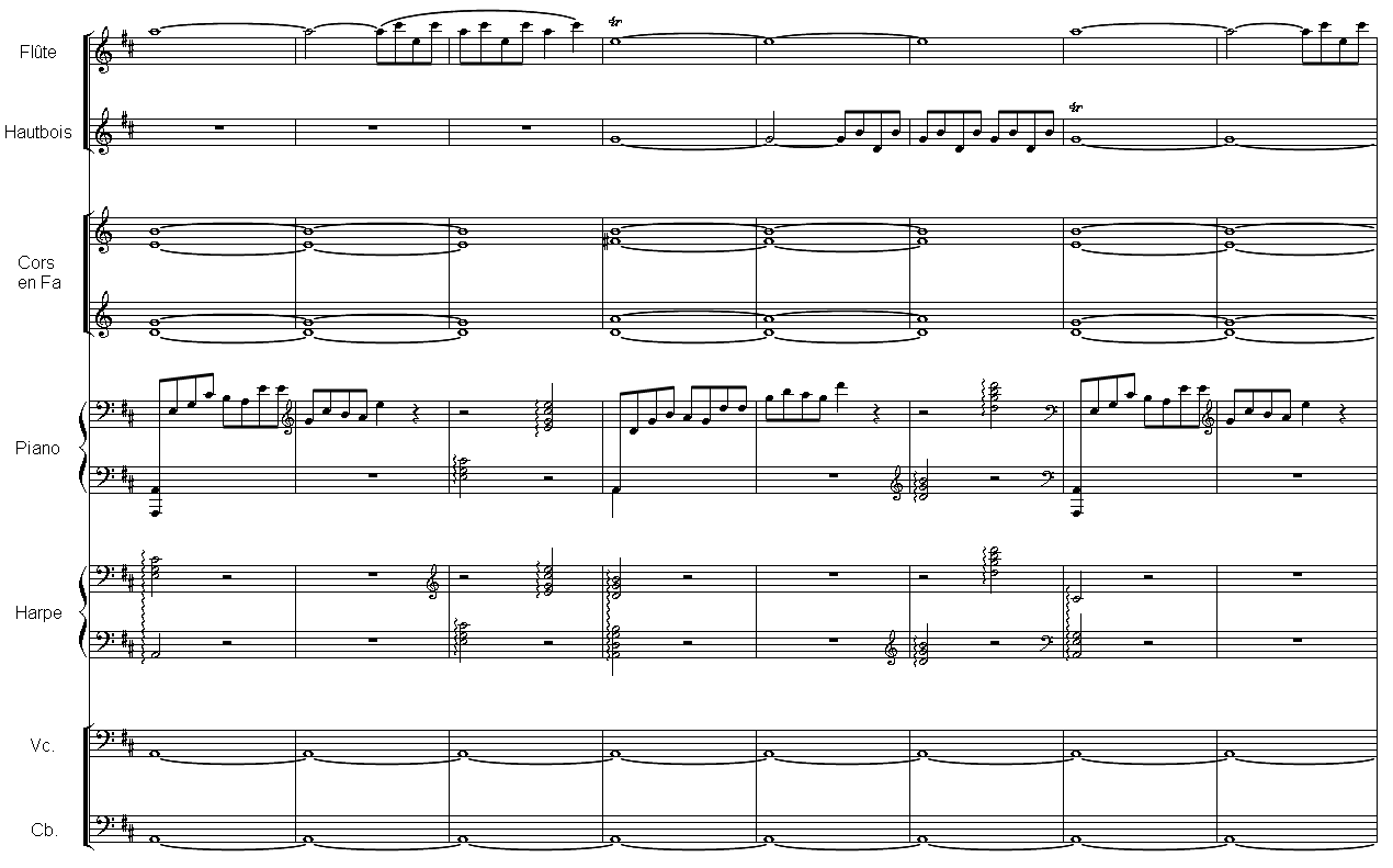 Rimski-Korsakov Snegourotchka acte IV